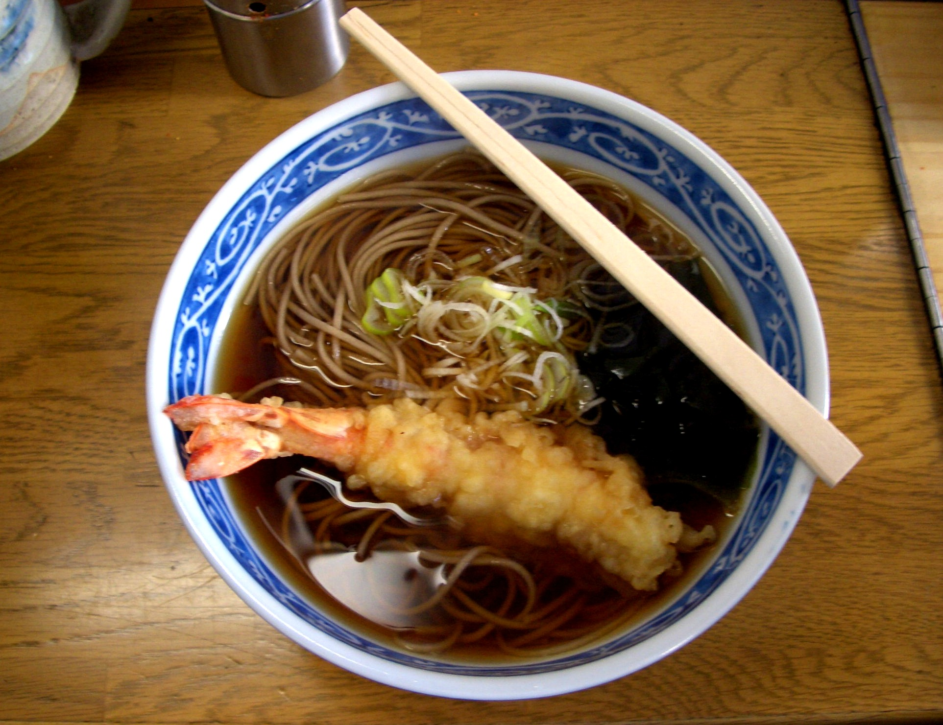 Tenpura soba, soba guarnita con un gambero fritto. Foto scattata da me al mercato del pesce di Tsukiji il 31.10.06.